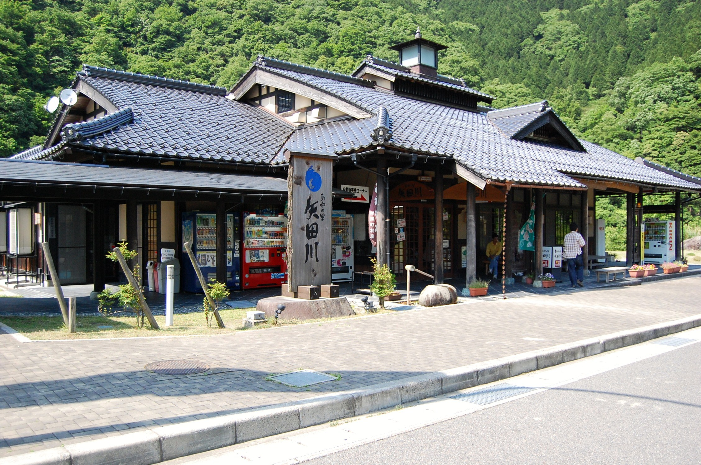 道の駅・あゆの里・矢田川